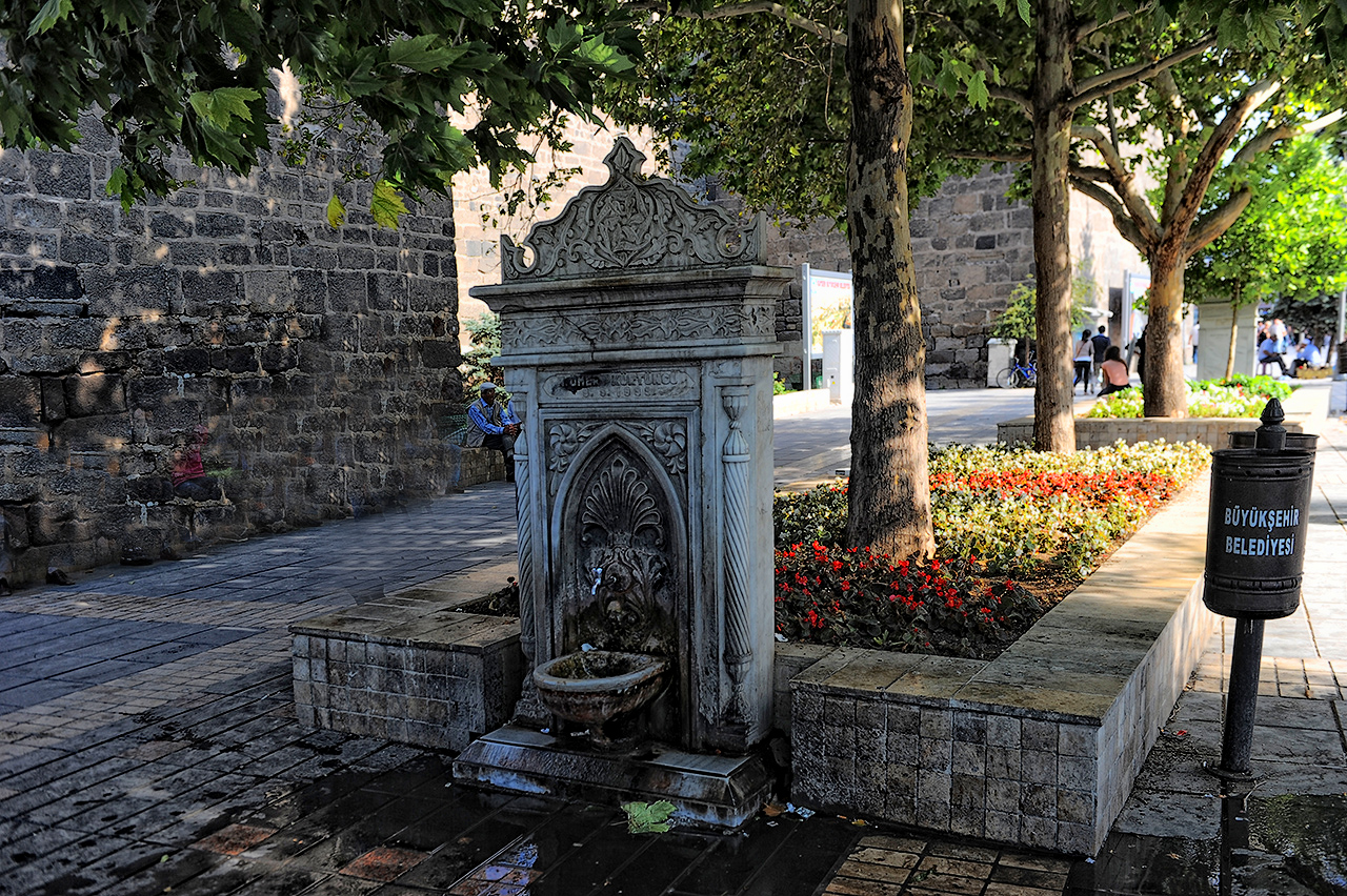 Фонтан в Кайсери